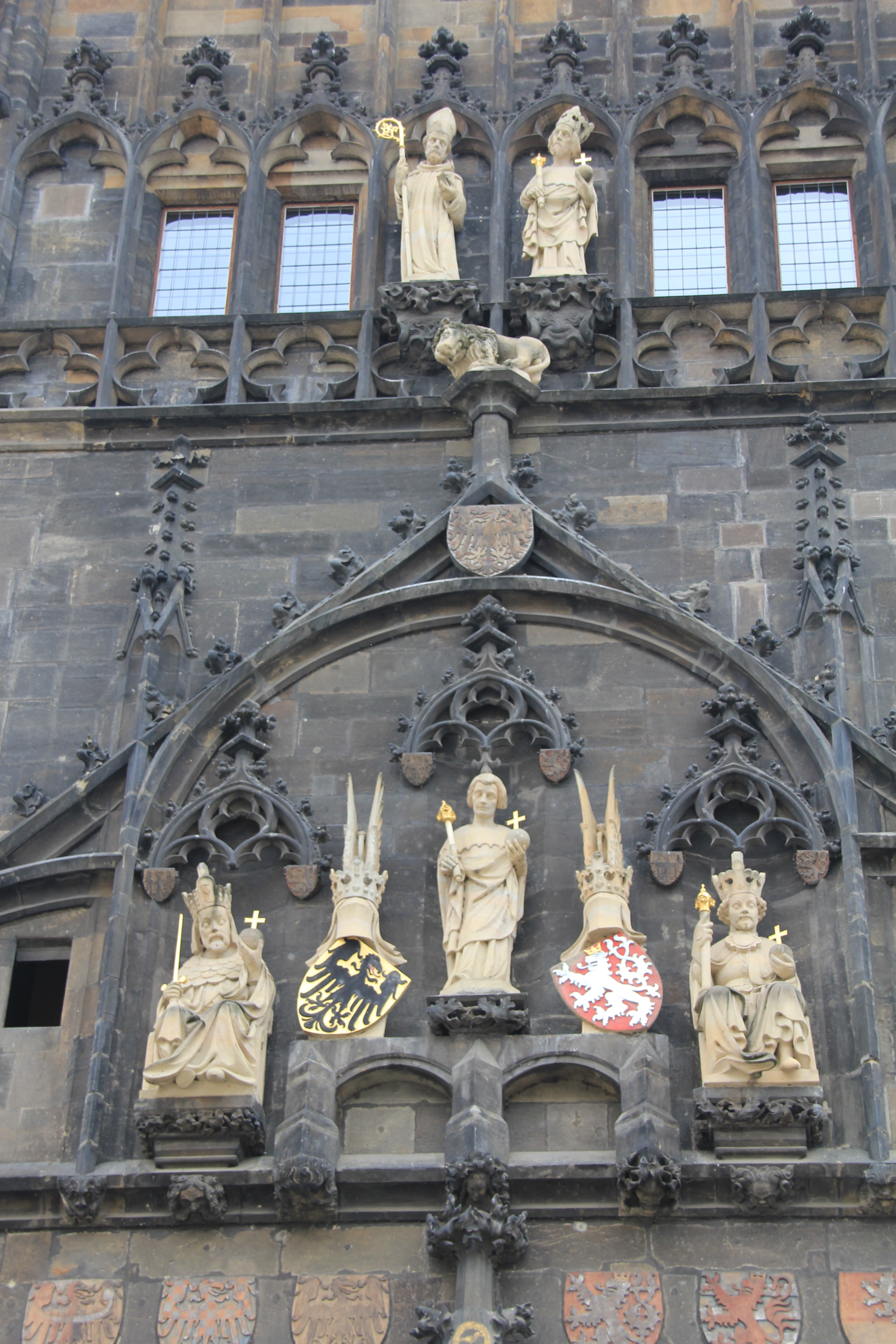 figurer på tårnet mot gamlebyen